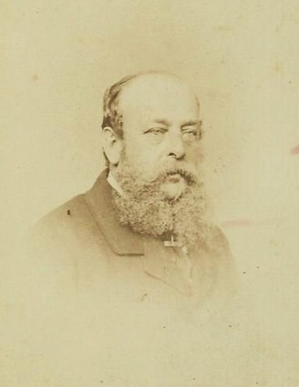 Скобелев Дмитрий Иванович (1821-1879)